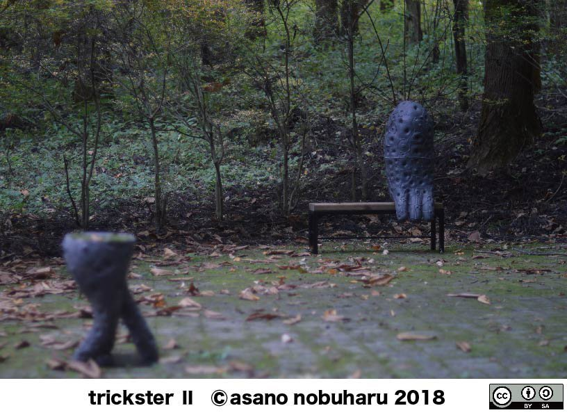 トリックスター作品展示の様子